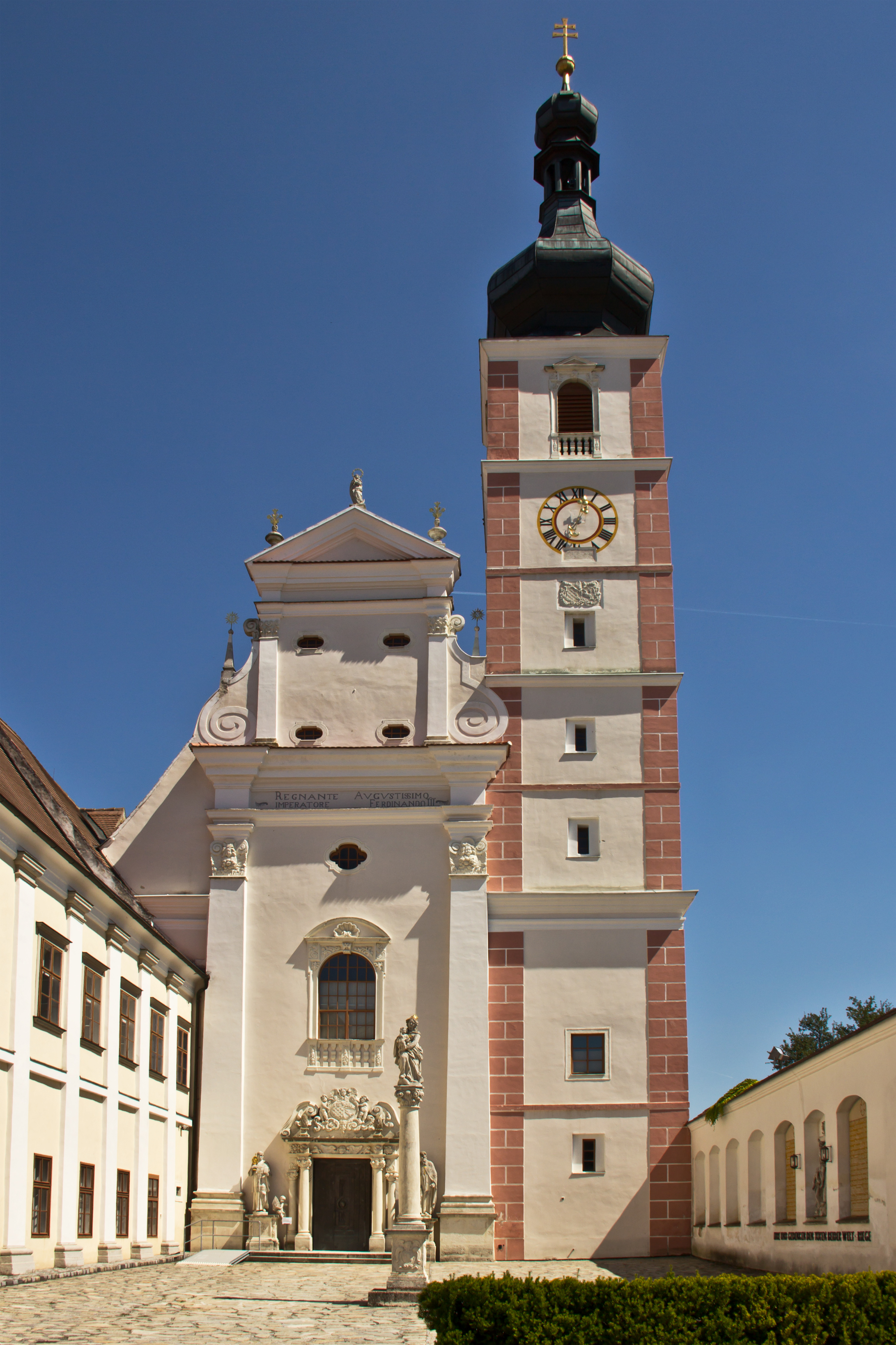 Die Stiftskirche ist eine romanische Pfeilerbasilika, die später gotisiert wurde.